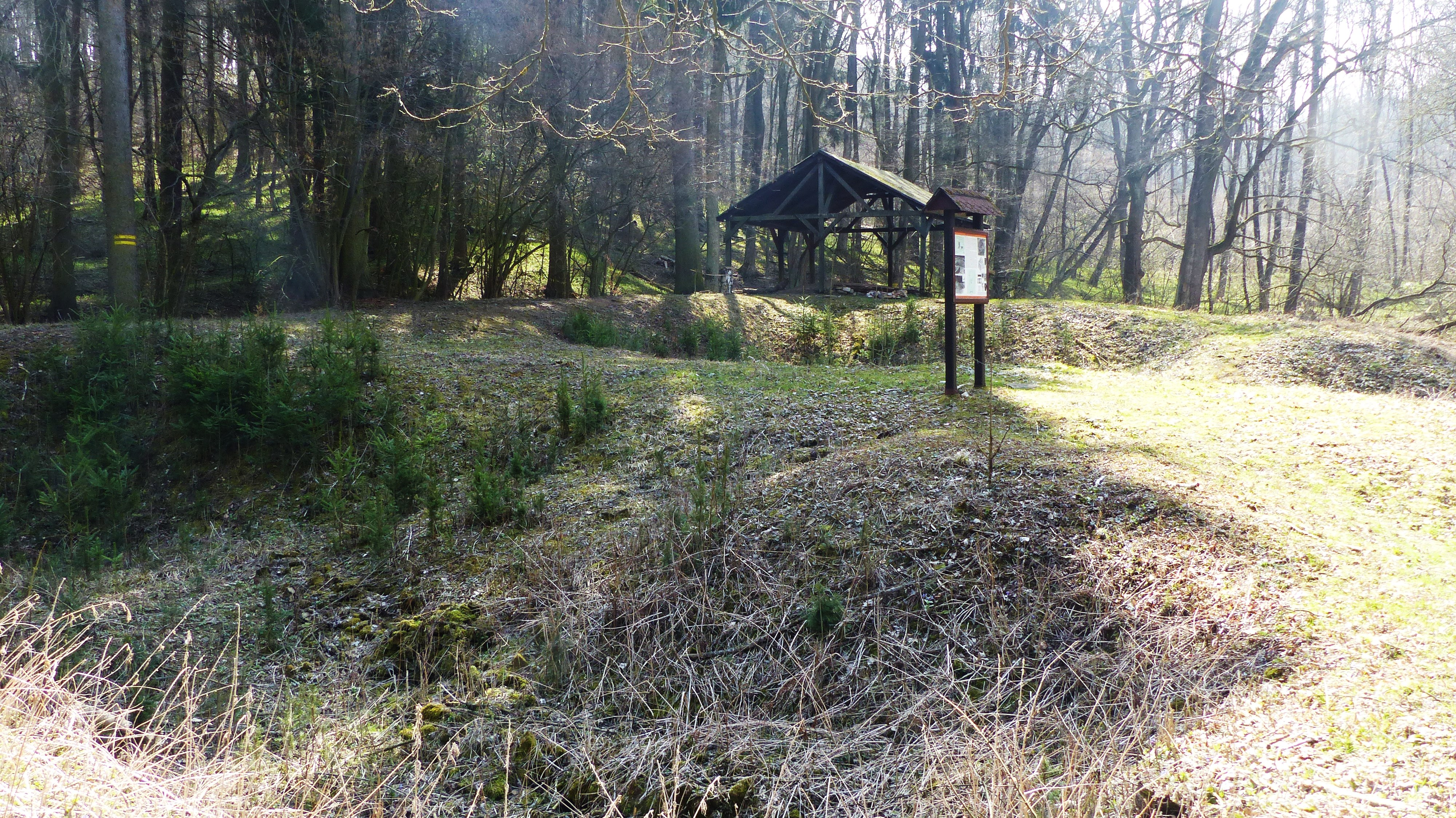 Jen terénní nerovnosti svědčí o někdejší tvrzi. Pod stříškou je hliněná pec